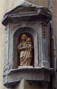 Palazzo del Paciarelli, piazza della Repubblica, Firenze.